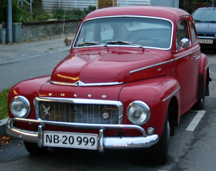 Volvo. PV544. 2004 Fotograferet på Rødovrevej, november 2004. Â©2004 Hans Jørn Storgaard Andersen